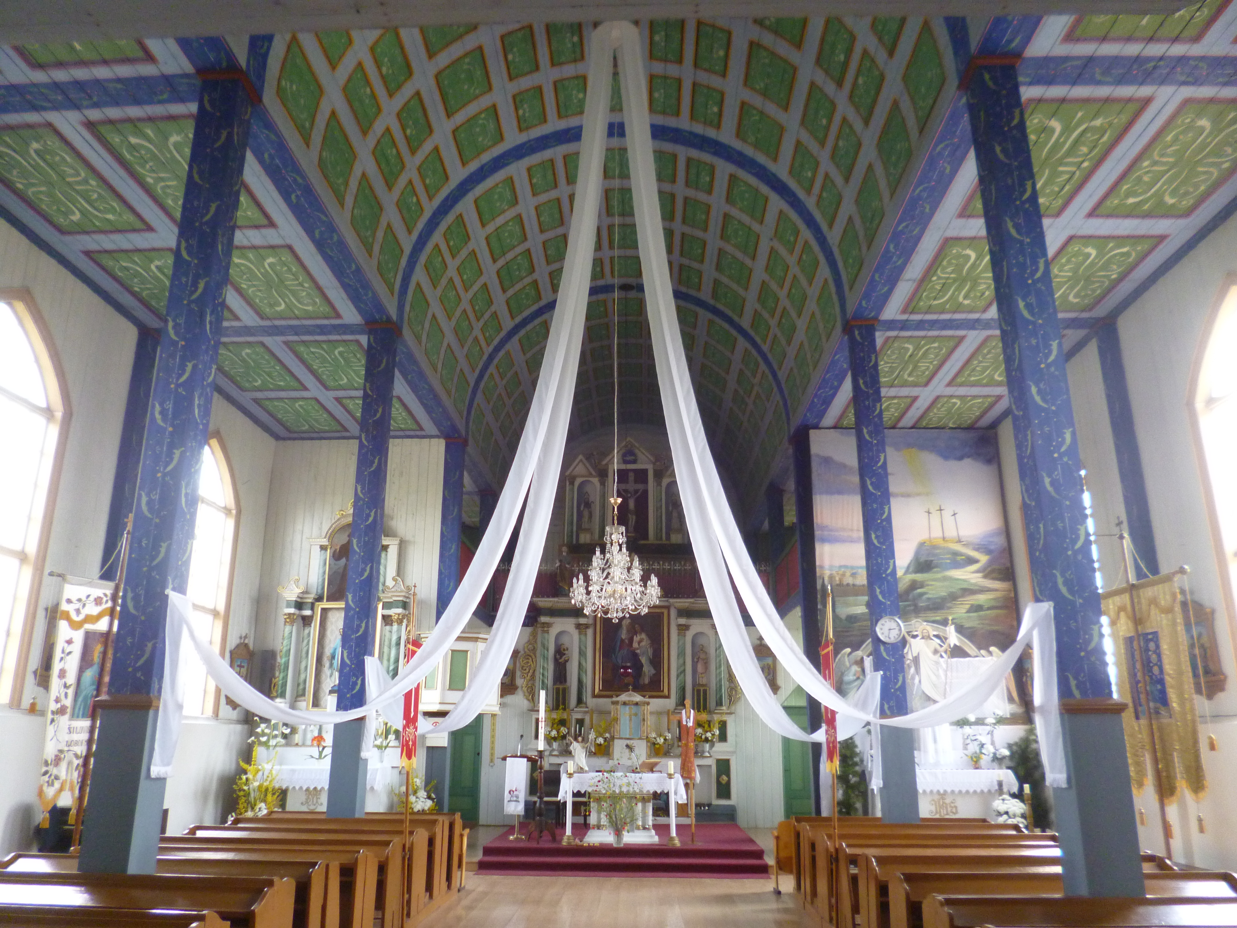 Kirko Sankta Maria Magdalena en Girdžiai, Litovio, interne